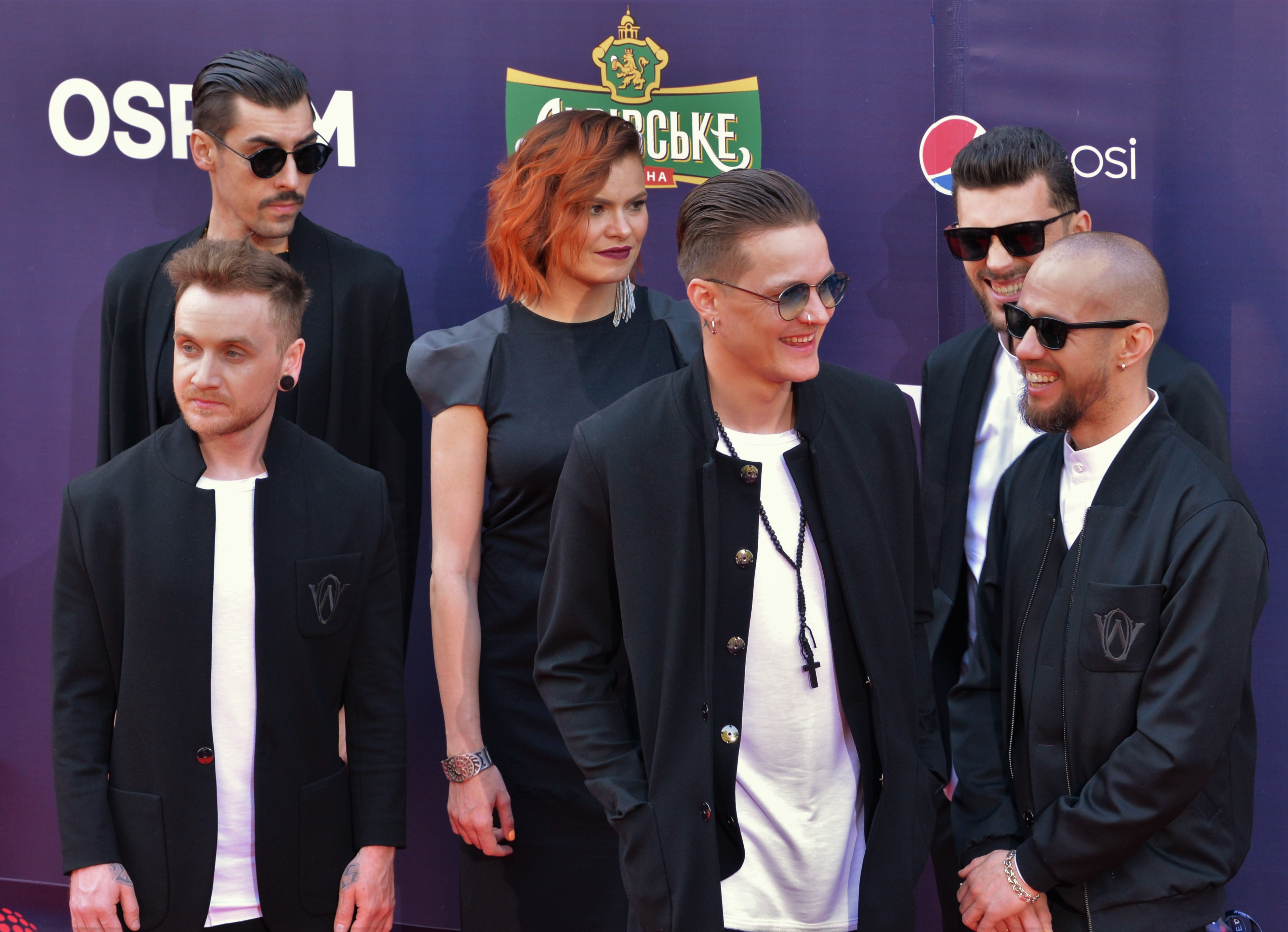 Рок-гурт O.Torvald на "червоному килимку" церемонії відкриття пісенного конкурсу Євробачення 2017 у Києві